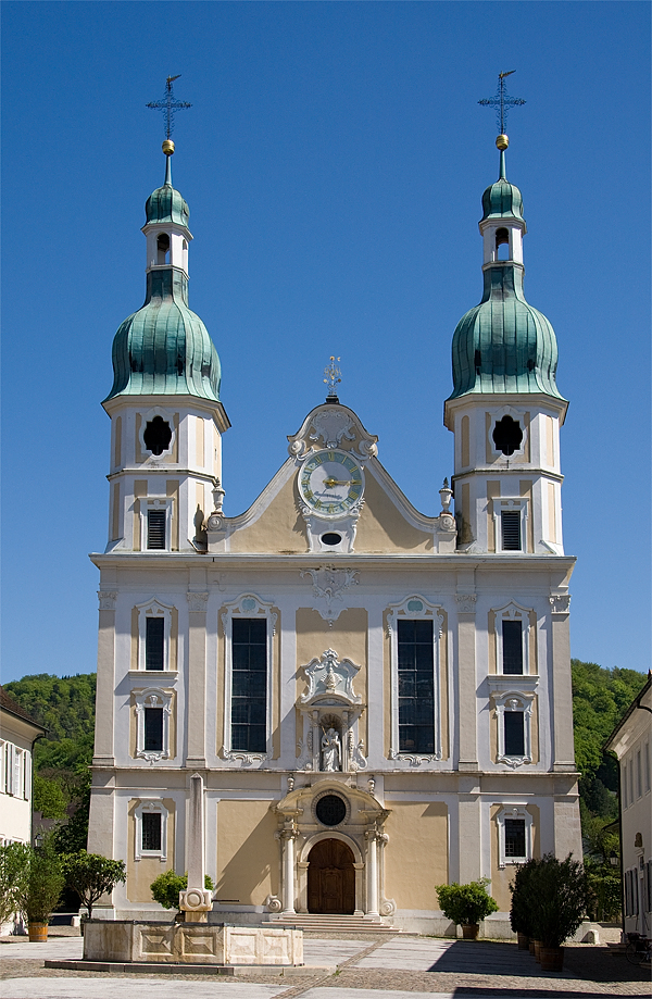 Dom in Arlesheim